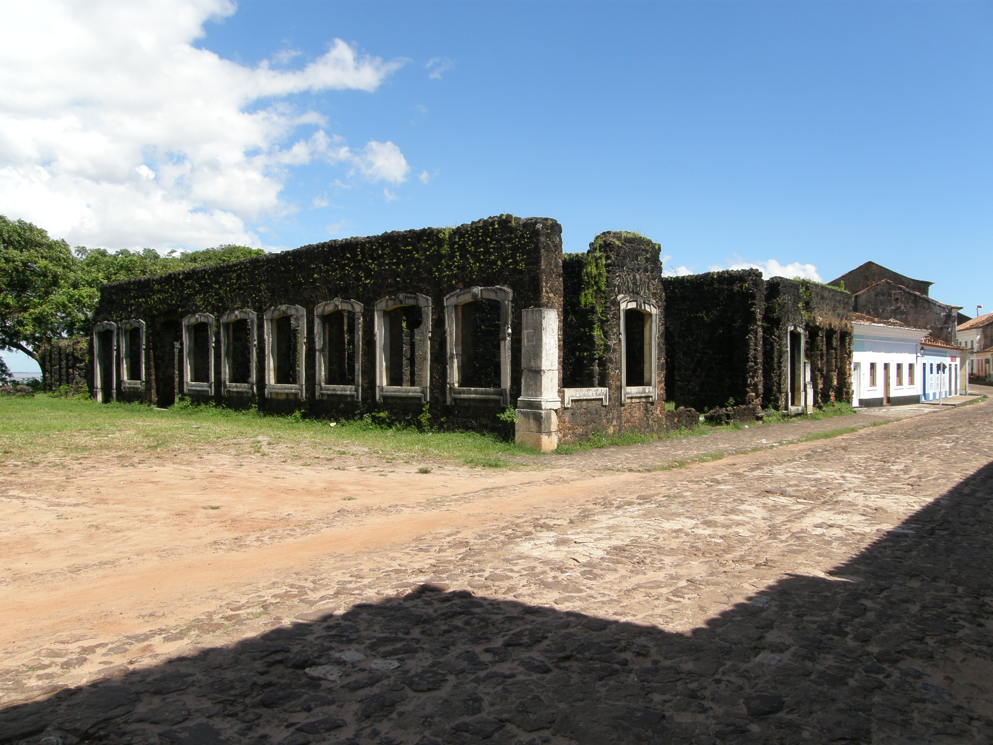 Alcântara, MA: conjunto arquitetônico e urbanístico